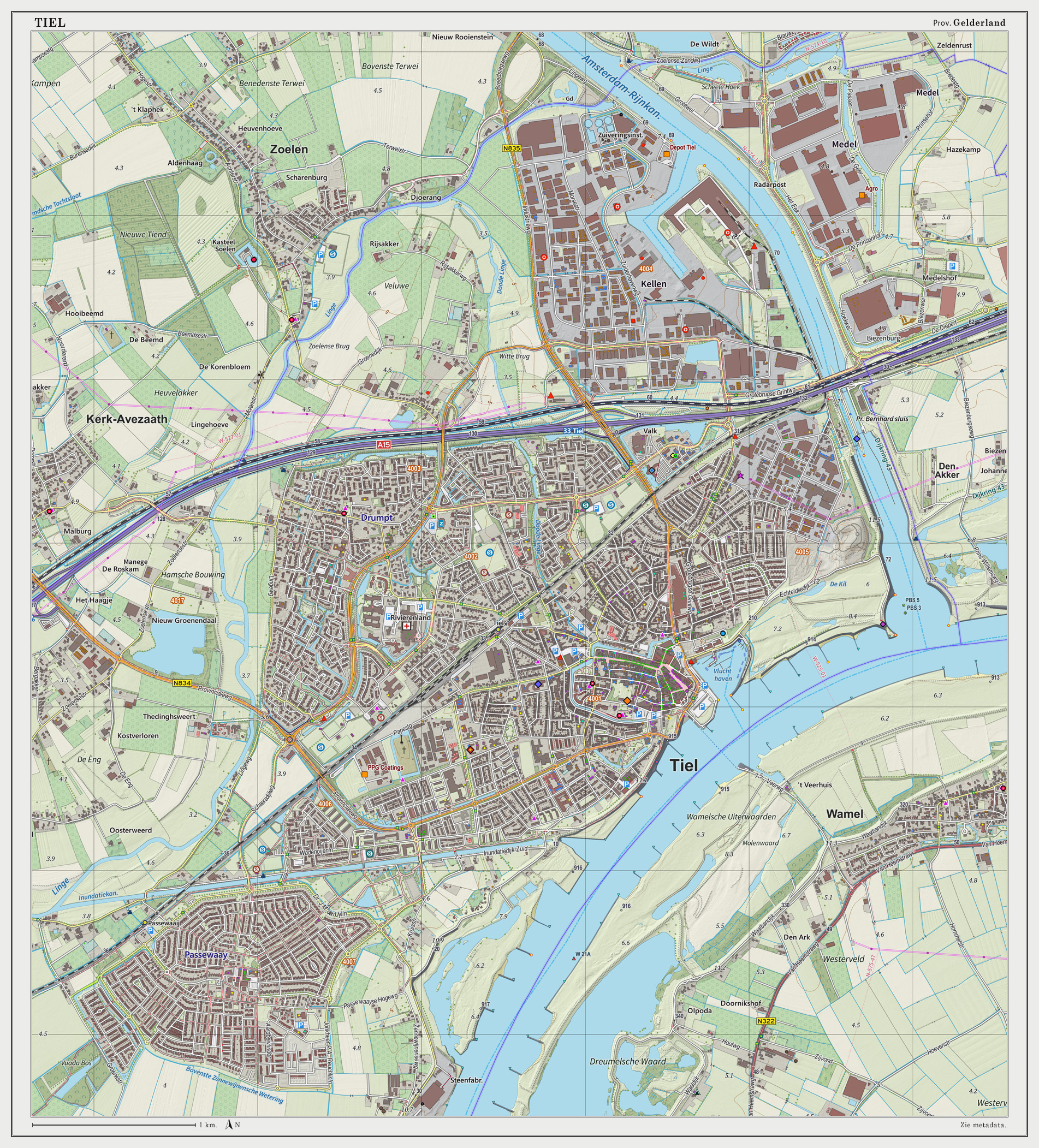 Topografische kaart van Tiel (woonplaats). Resolutie: 300 pixels/km. Kaartbeeld samengesteld uit de open geodata van de Top10NL en Top25namen (Basisregistratie Topografie, Kadaster), Creative Commons BY licentie. Gebouwvlakken uit open geodata BAG extract. Wegen uit de OpenStreetMap. Reliëfschaduw uit de Actuele Hoogtekaart AHN2. Samenstelling en kleurenschema: Jan-Willem van Aalst, met QGIS2. Zie ook de Legenda.